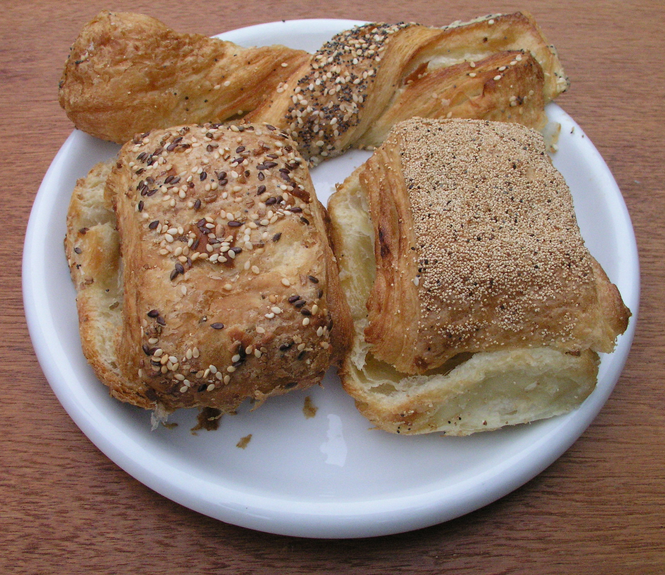 Frøsnapper (øverst), tebirkes (t.h.) og grovbirkes (t.v.)